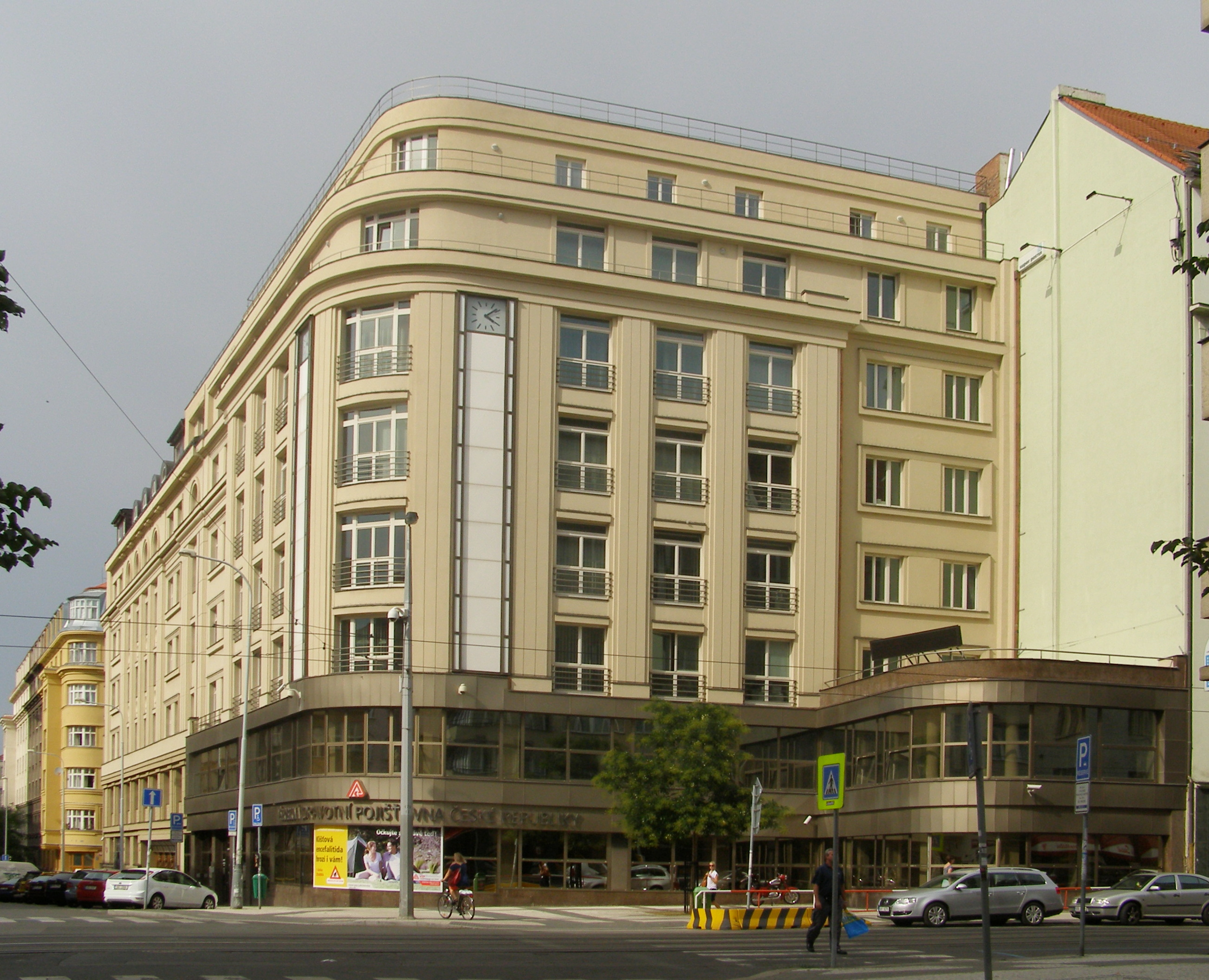 Hotel a kino Flora, Praha 3-Vinohrady, Orlická, Přemyslovská 2020/22.